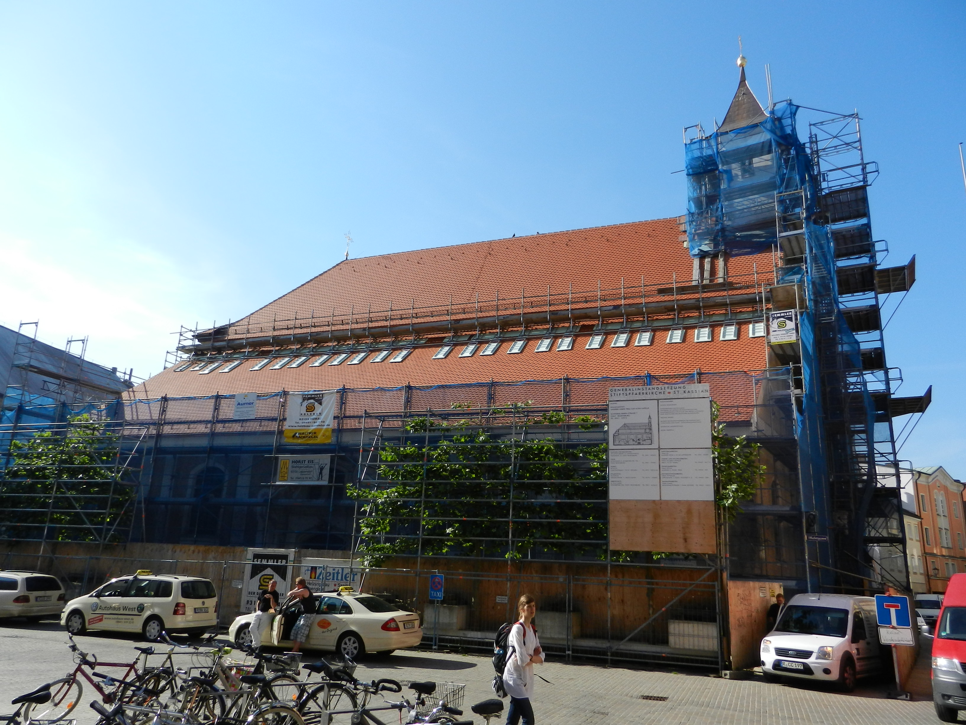 Pfarrkirche St. Kassian (Regensburg) im Mai 2011 während der laufenden Restaurierung